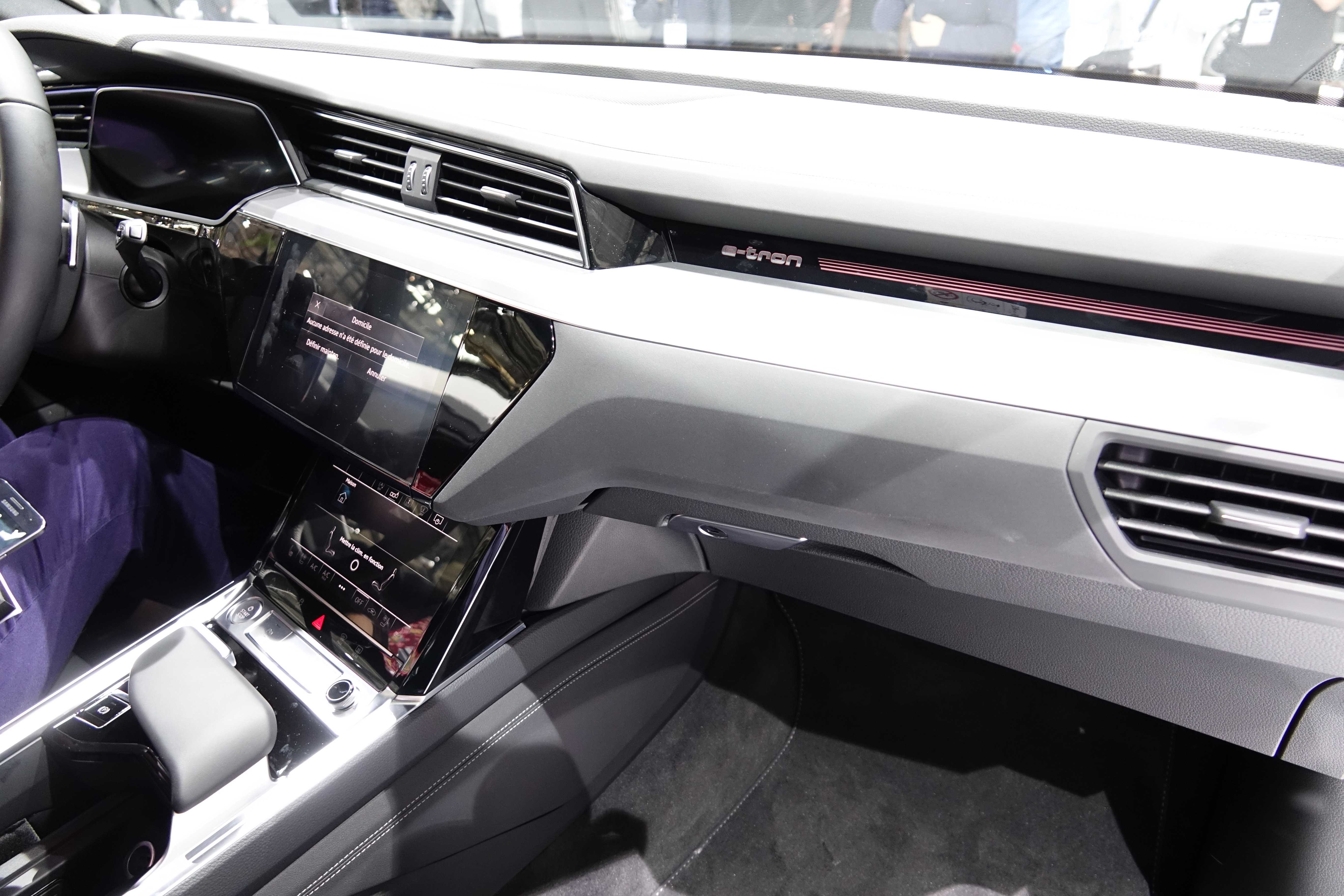 Audi e-tron quattro au Mondial Paris Motor Show 2018